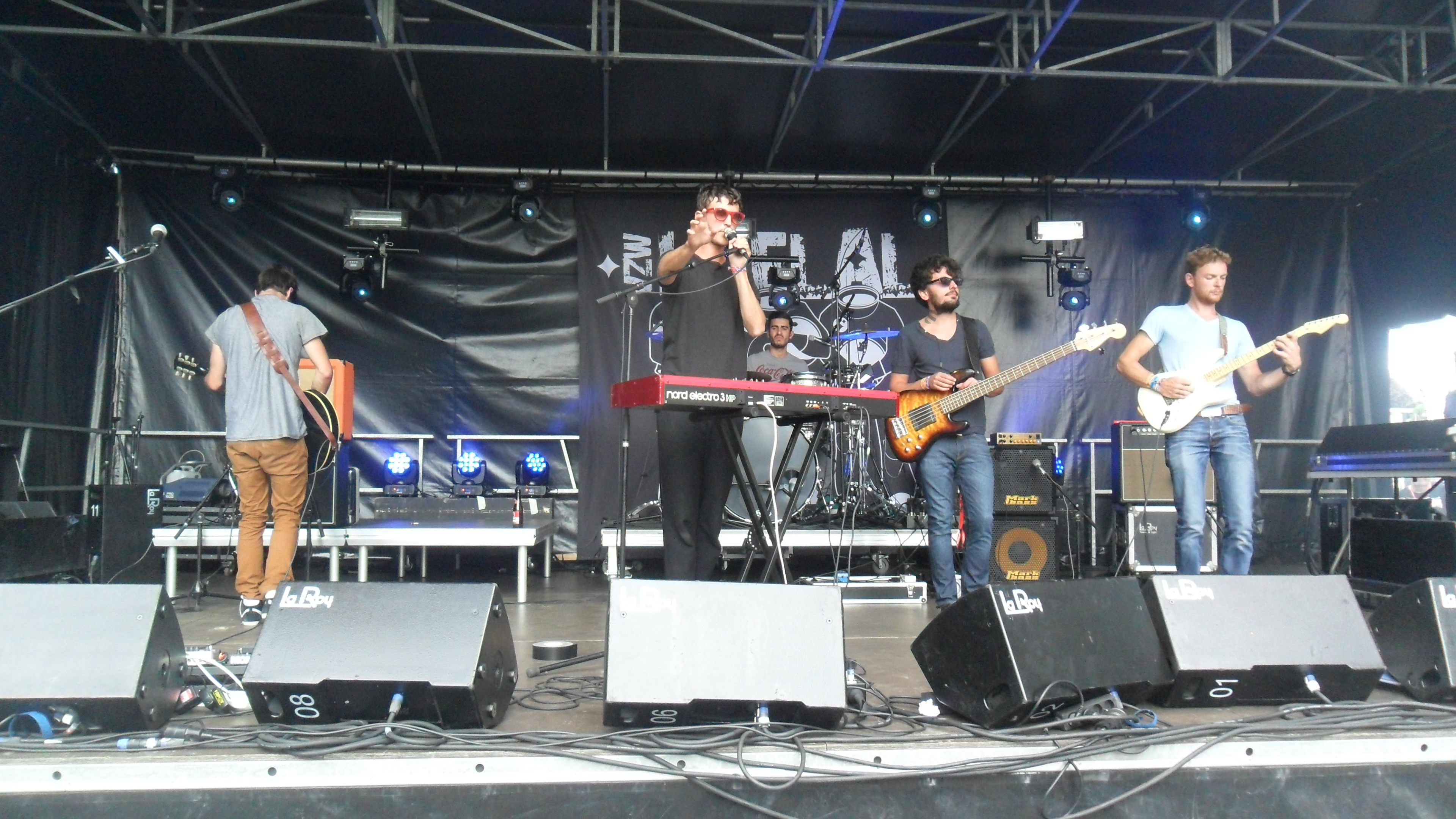 Oscar and the Wolf op Melkrock